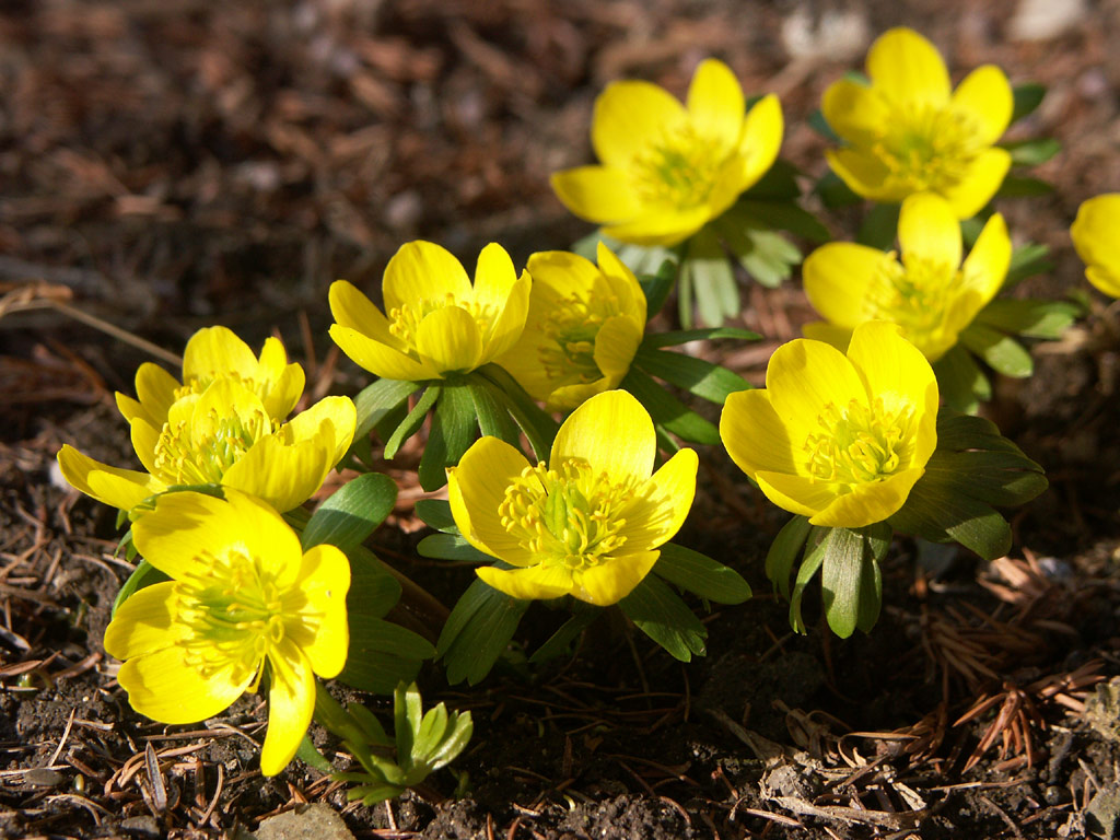 Winterlingblüte im März 2010